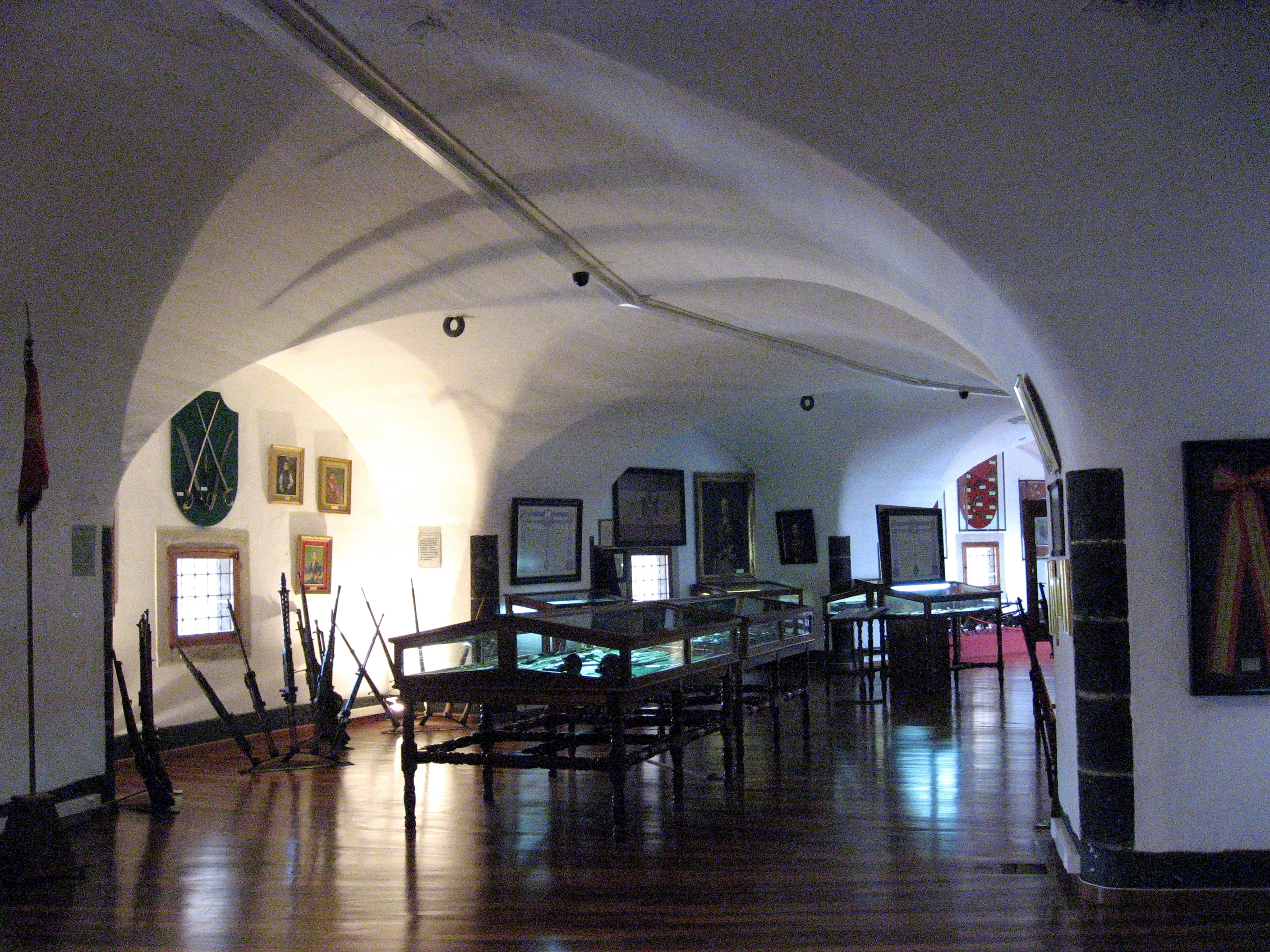 Interior del Museo Militar, Fuerte de Almeyda, Santa Cruz de Tenerife.